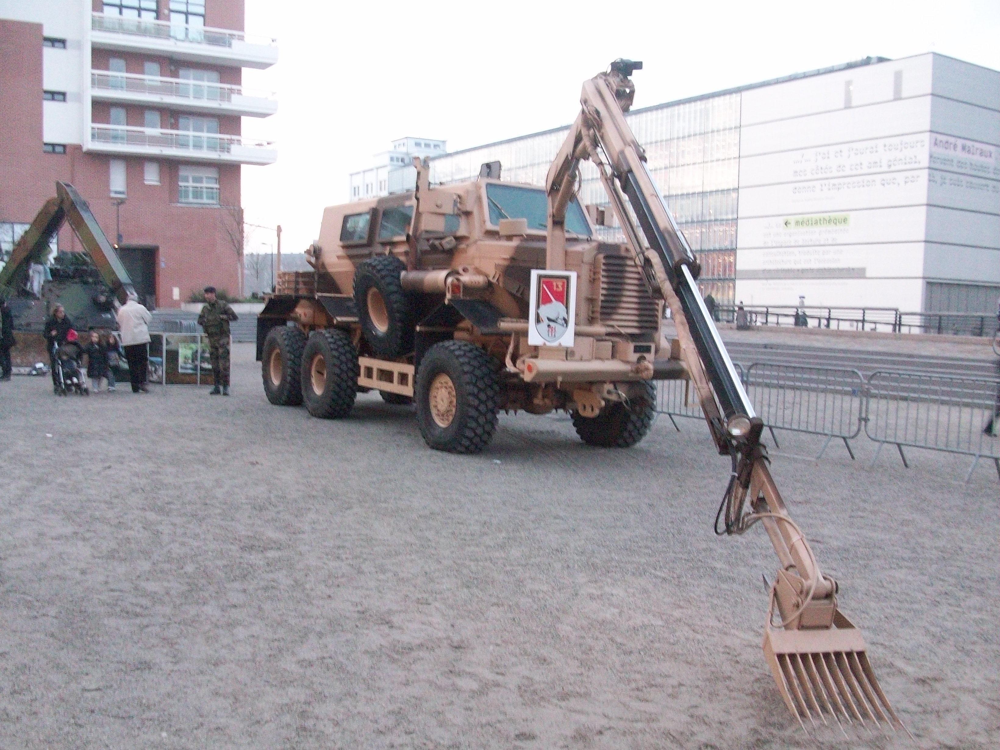 Présentation de véhicules de l'armée française devant Rivétoile, Strasbourg